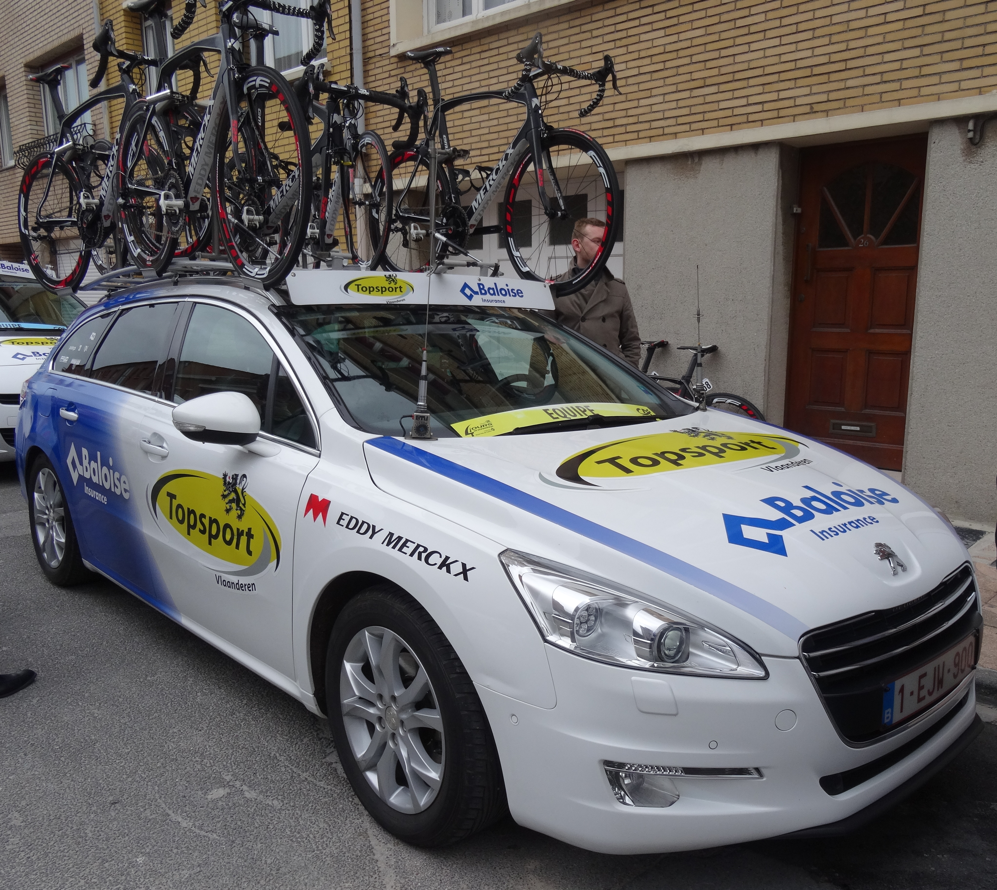 Reportage photographique réalisé le dimanche 11 mai 2014 au départ de la cinquième et dernière étape de l'édition 2014 des Quatre jours de Dunkerque à Saint-Pol-sur-Mer, Nord, Nord-Pas-de-Calais, France. Depicted team: Topsport Vlaanderen-Baloise